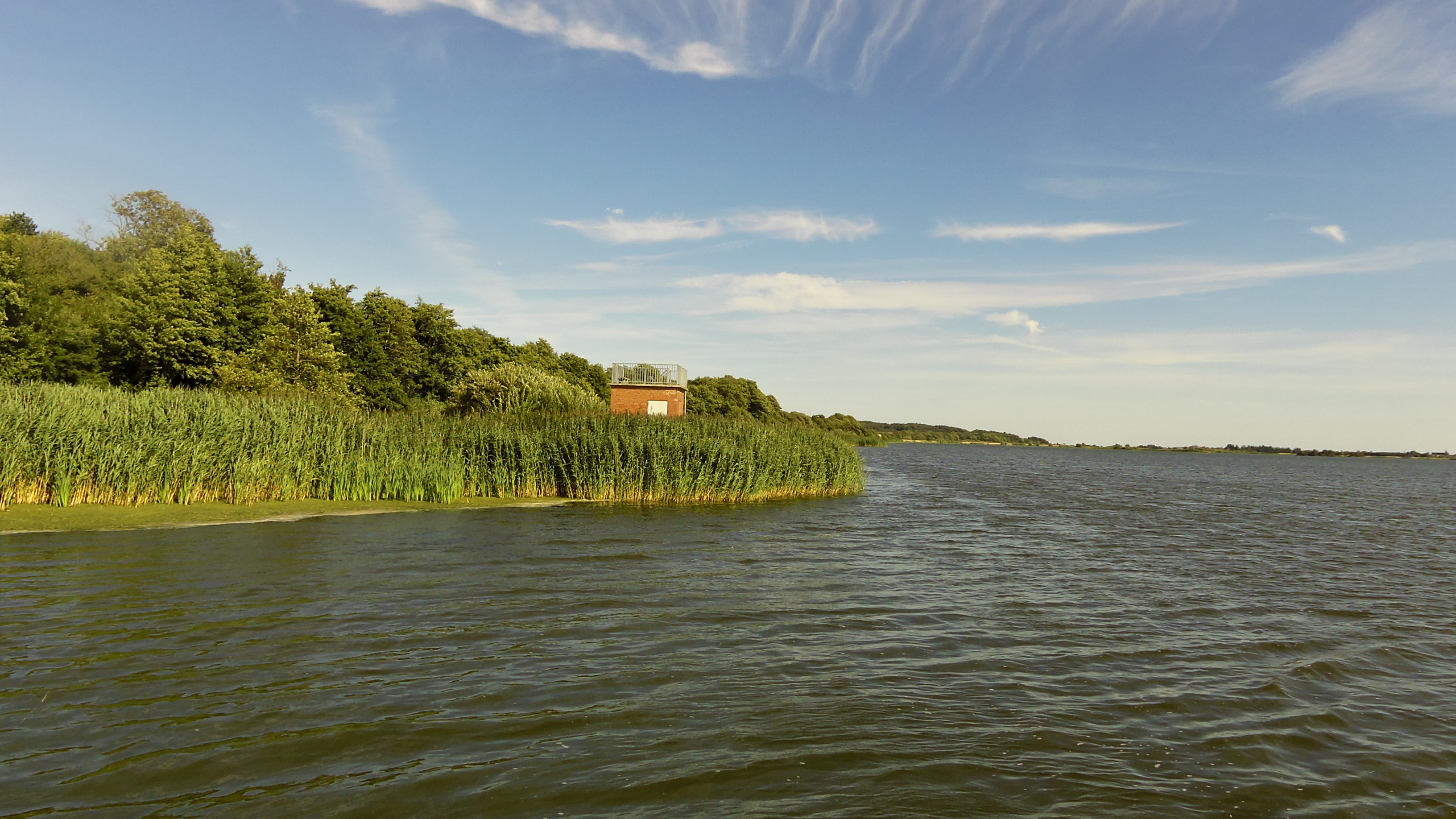 Den tidligere pumpestation der nu fungerer som udsigtstårn